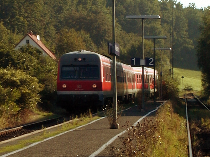 Regionalbahn 35386 aus Fürth fährt in den Bahnhof Wilhermsdorf ein. Zenngrundbahn, VT614